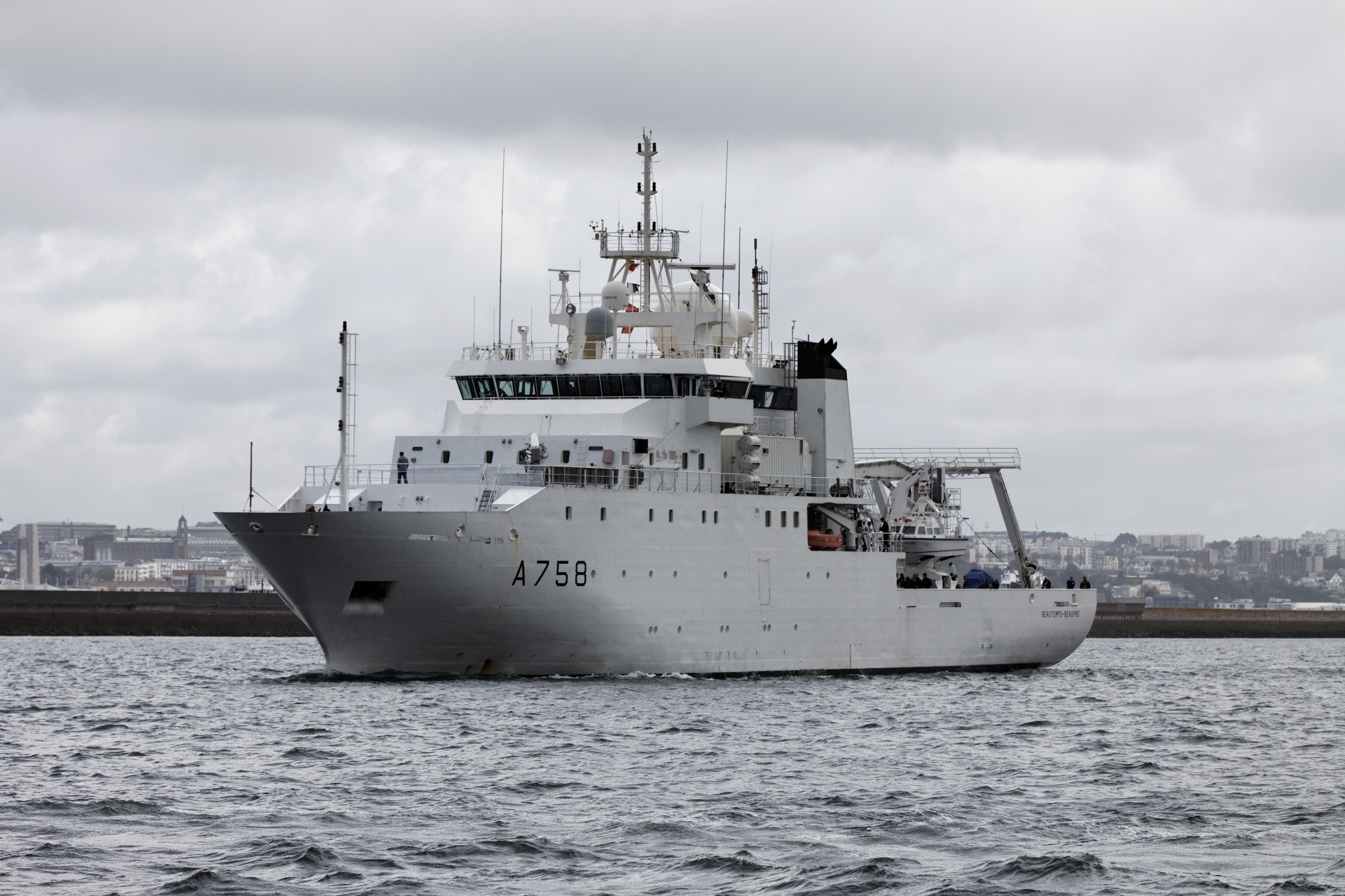 La grande parade des Tonnerres de Brest 2012 dans la rade de Brest en direction de Douarnenez.